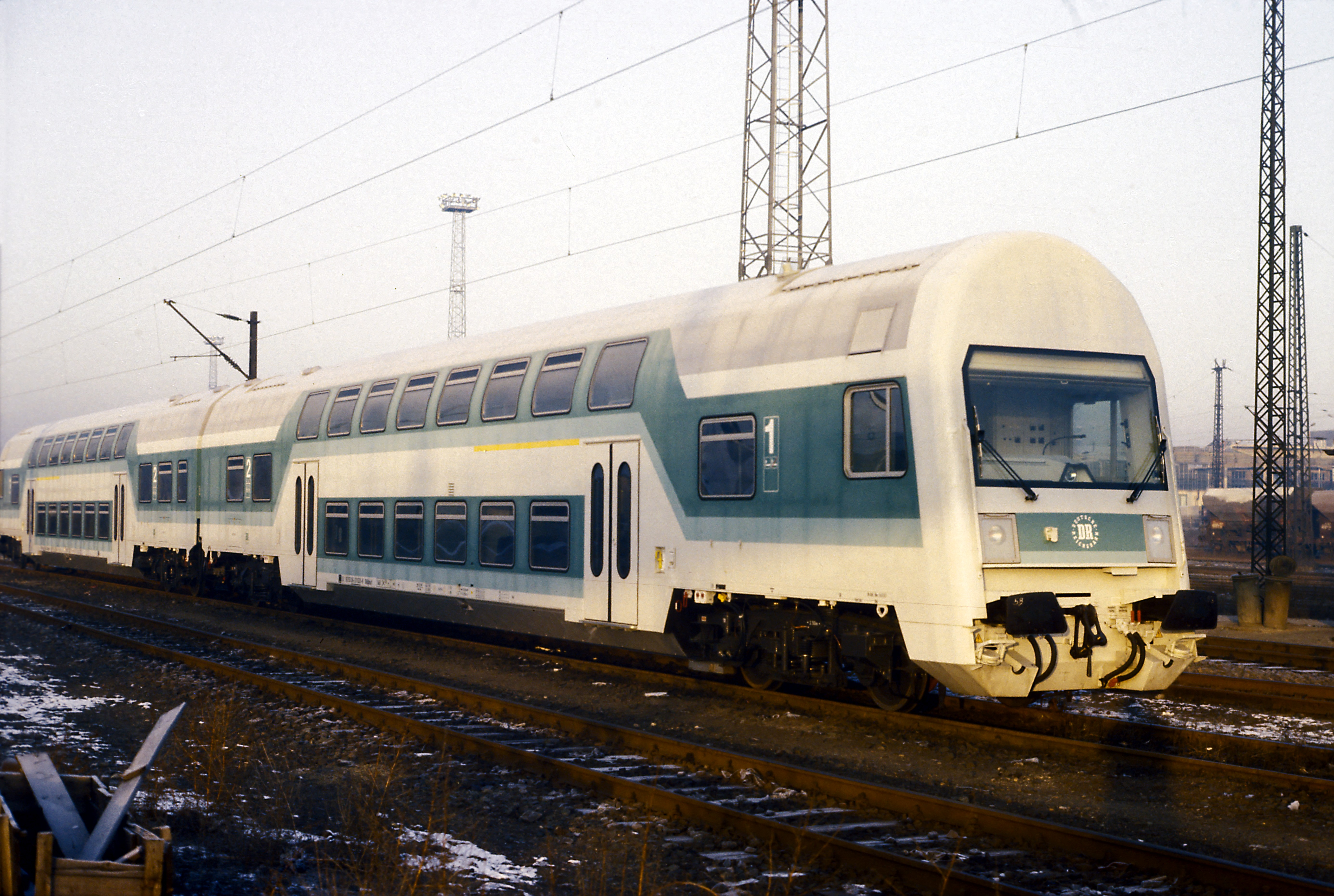 Neubaudoppelstocksteuerwagen bei Auslieferung. Die ersten Fahrzeuge mit breiterer Dachpartie für bessere Schulterfreiheit.